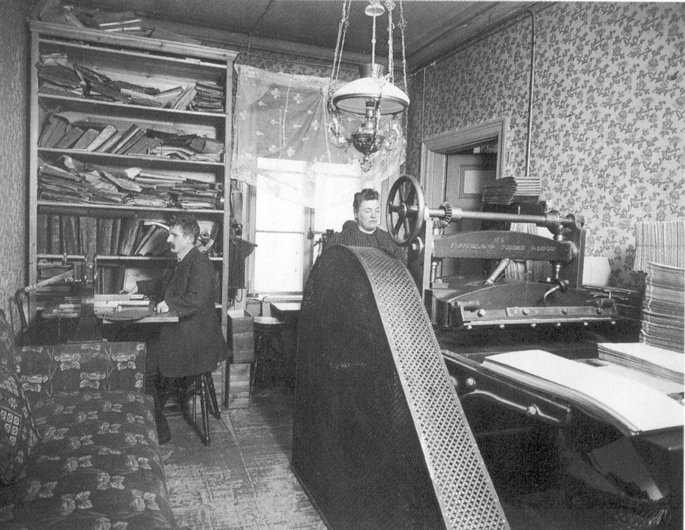 Punktskriftstryckeri. = Braille printer workshop. De blindas förening, Stockholm